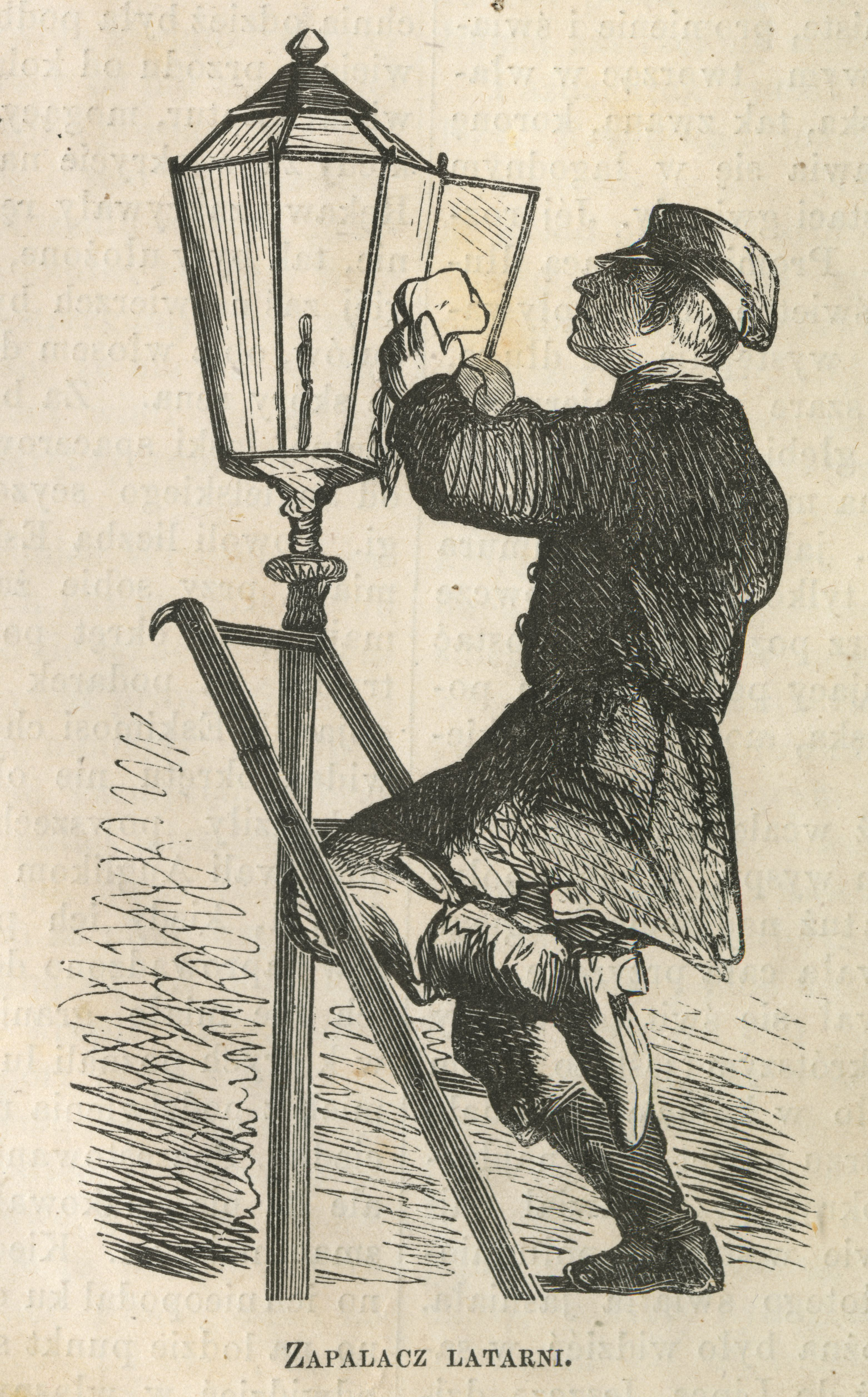 Zapalacz latarni